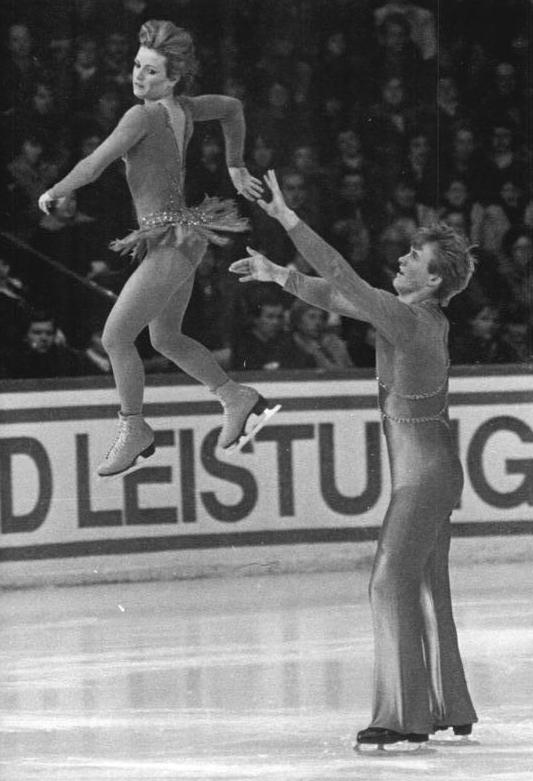 Barbara Underhill, Paul Martini ADN-ZB Thieme 29.3.83 Karl-Marx-Stadt: ISU-Schaulauf-Tournee- Dieser gelungene Wurfaxel gehörte zum Programm der WM-Dritten Barbara Underhill - Paul Martini aus Kanada, die am 28.3. während der Veranstaltung in der Karl-Marx-Städter Eissporthalle auftraten.